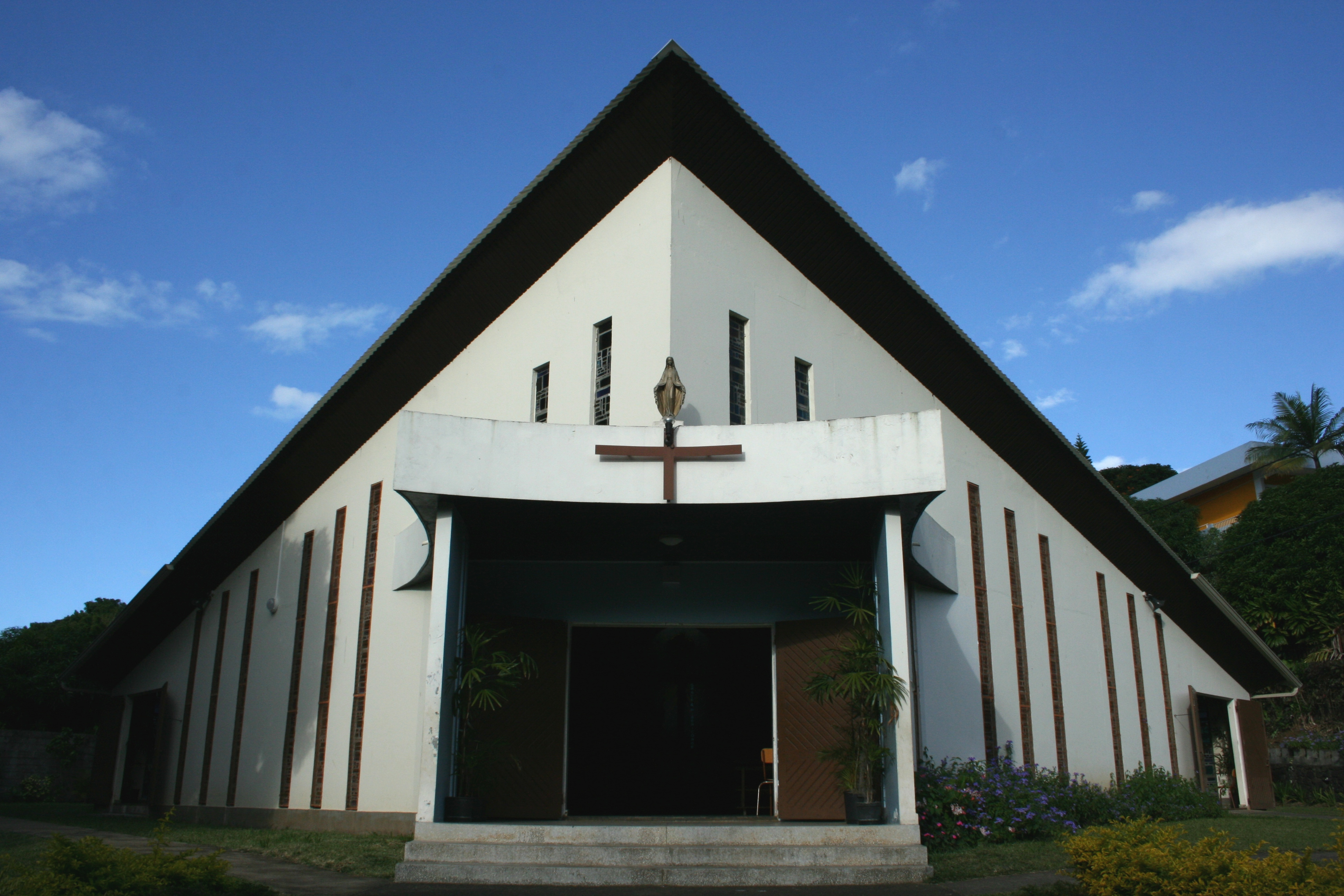 L'église Notre-Dame Auxiliaire à Sainte-Marie de La Réunion.